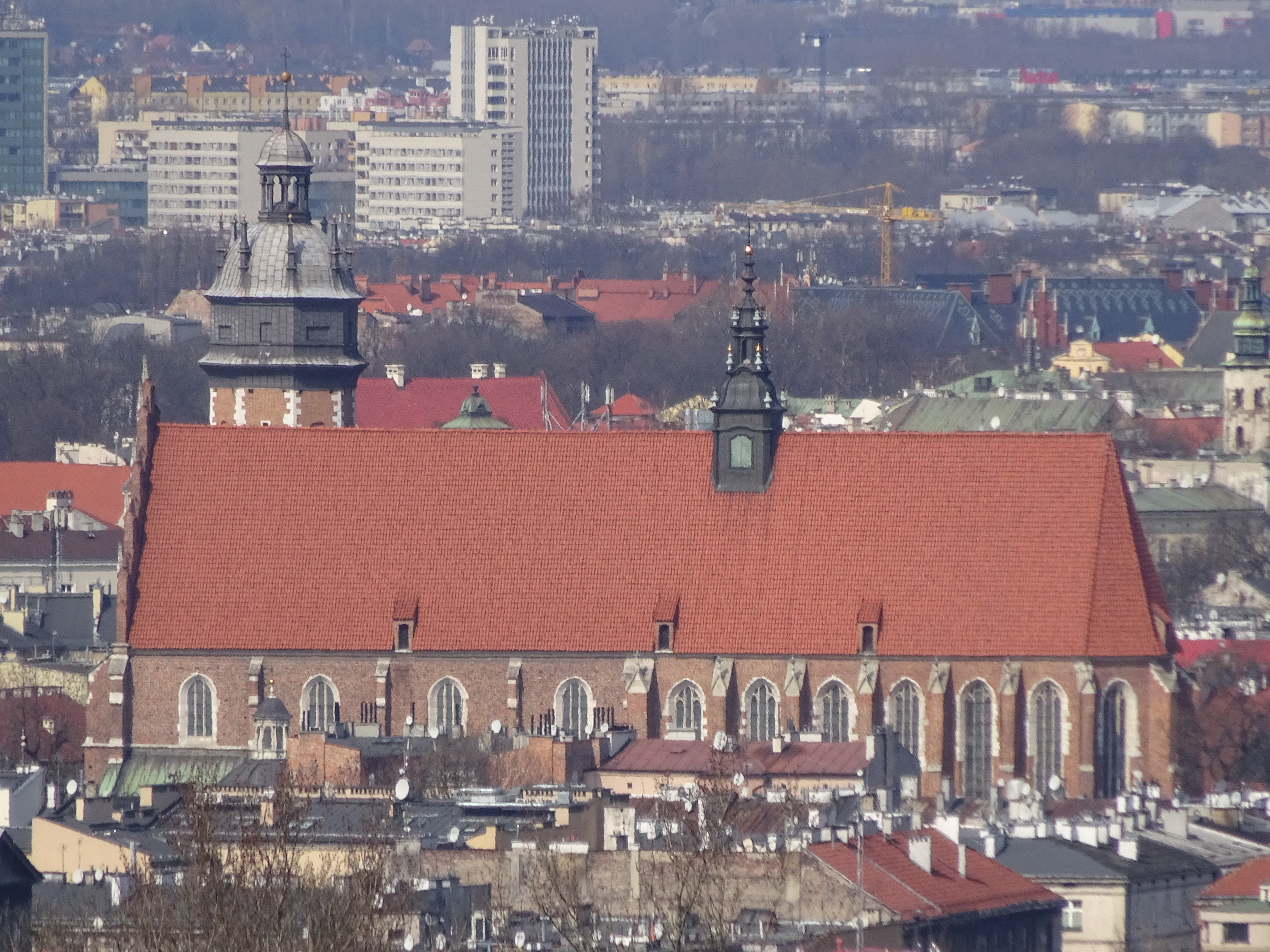 Widok z Kopca Kraka na Kościół Bożego Ciała w Krakowie na Kazimierzu. 2016